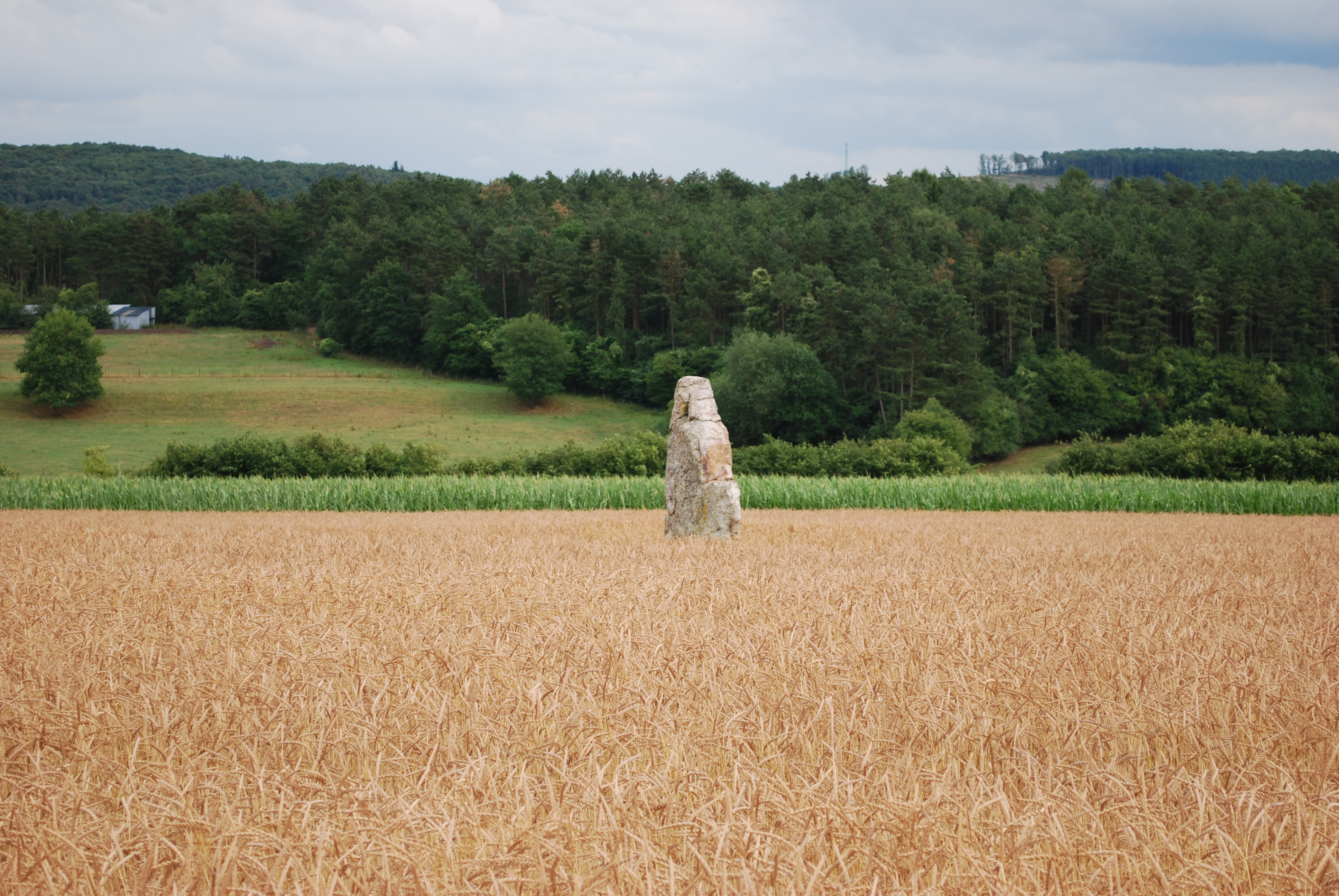 Le menhir d'Ozo, près d'Izier (Durbuy).